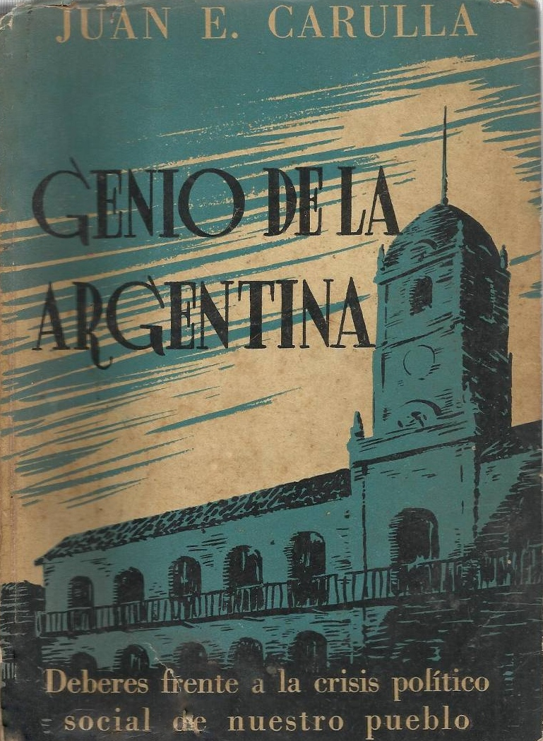 Couverture de 'Genio de la Argentina' de Juan Carulla, 1943